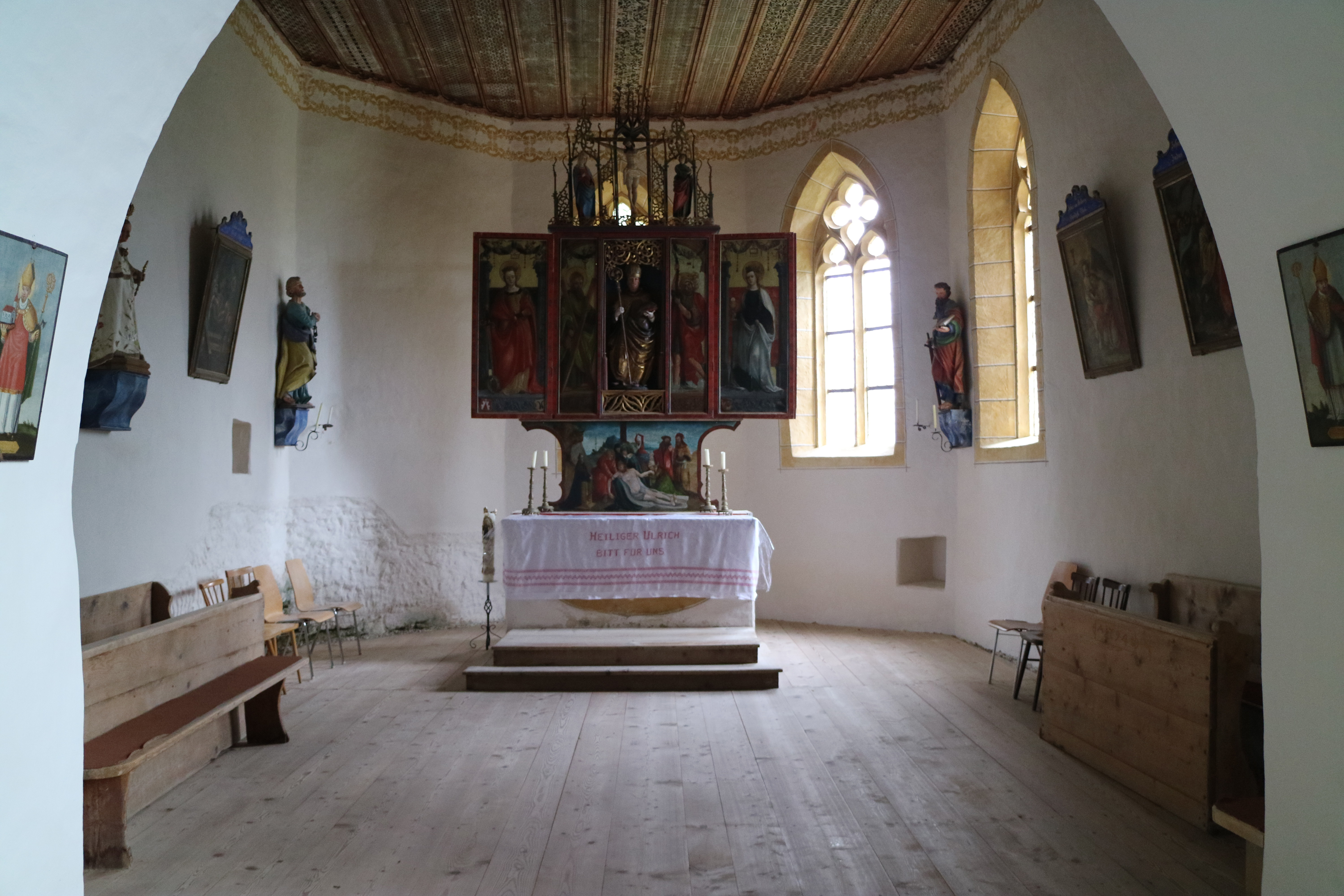 Blick ins Chor der katholischen Filialkirche St. Ulrich am Hollerberg